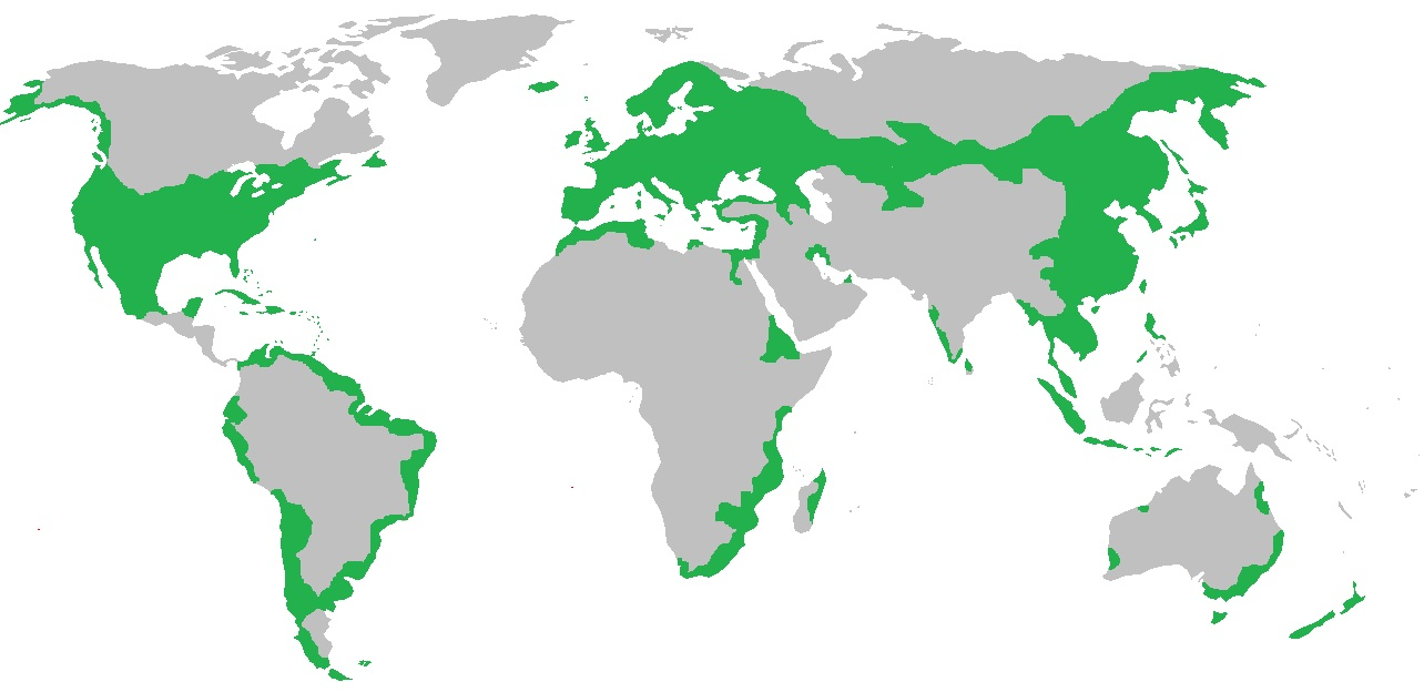 Mapamundi con la localizacion de rattus rattus